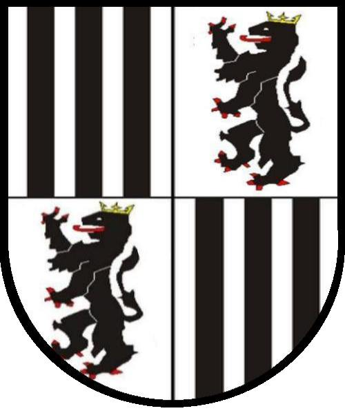 Wappen der Burggrafen von Kirchberg, geviertelt in Silber/Weiß drei schwarze Balken, mit bewehrtem, rotgezungtem, gekröntem schwarzen Löwen